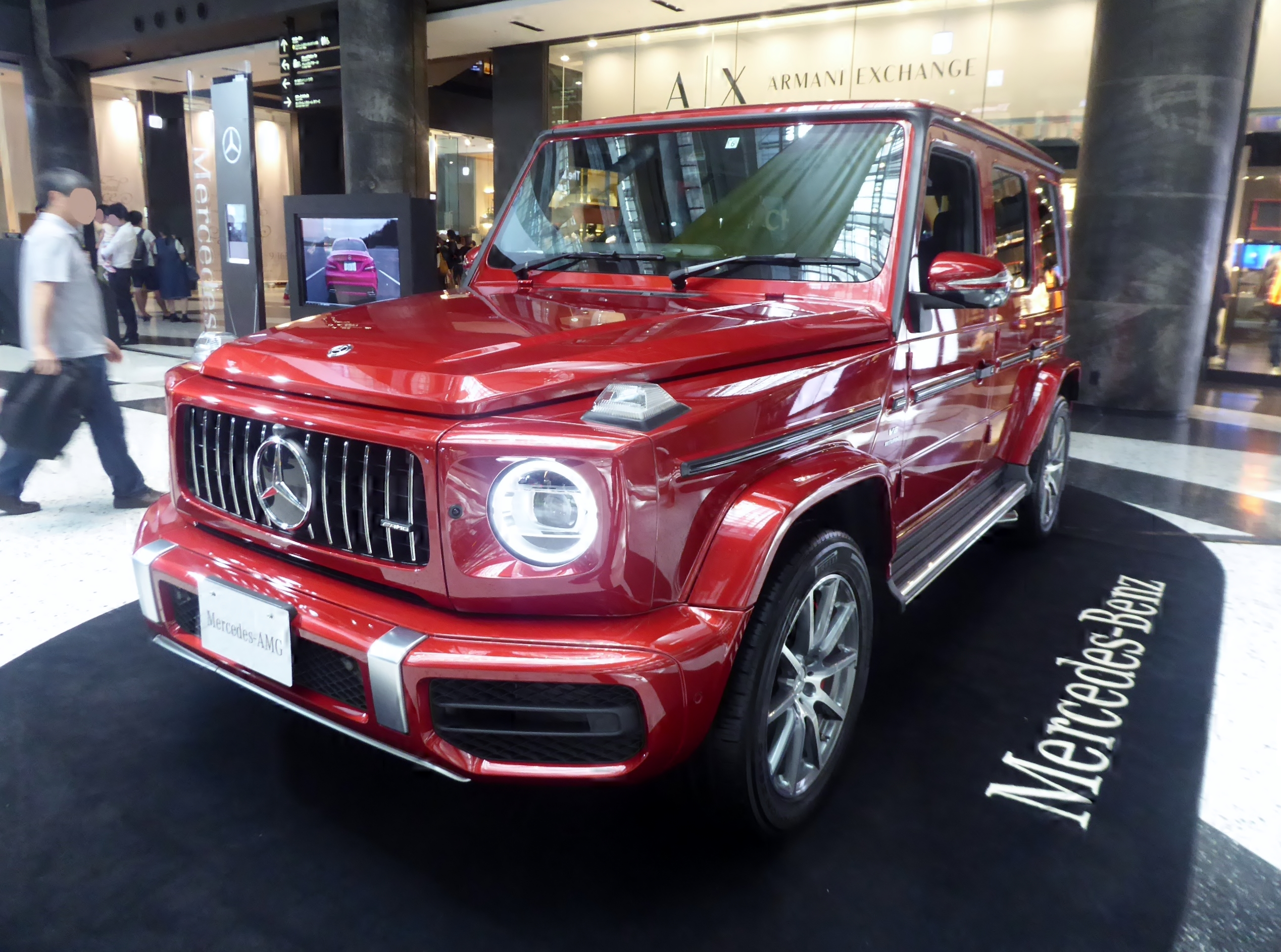 W464系メルセデスAMG・G63をフロントから撮影。